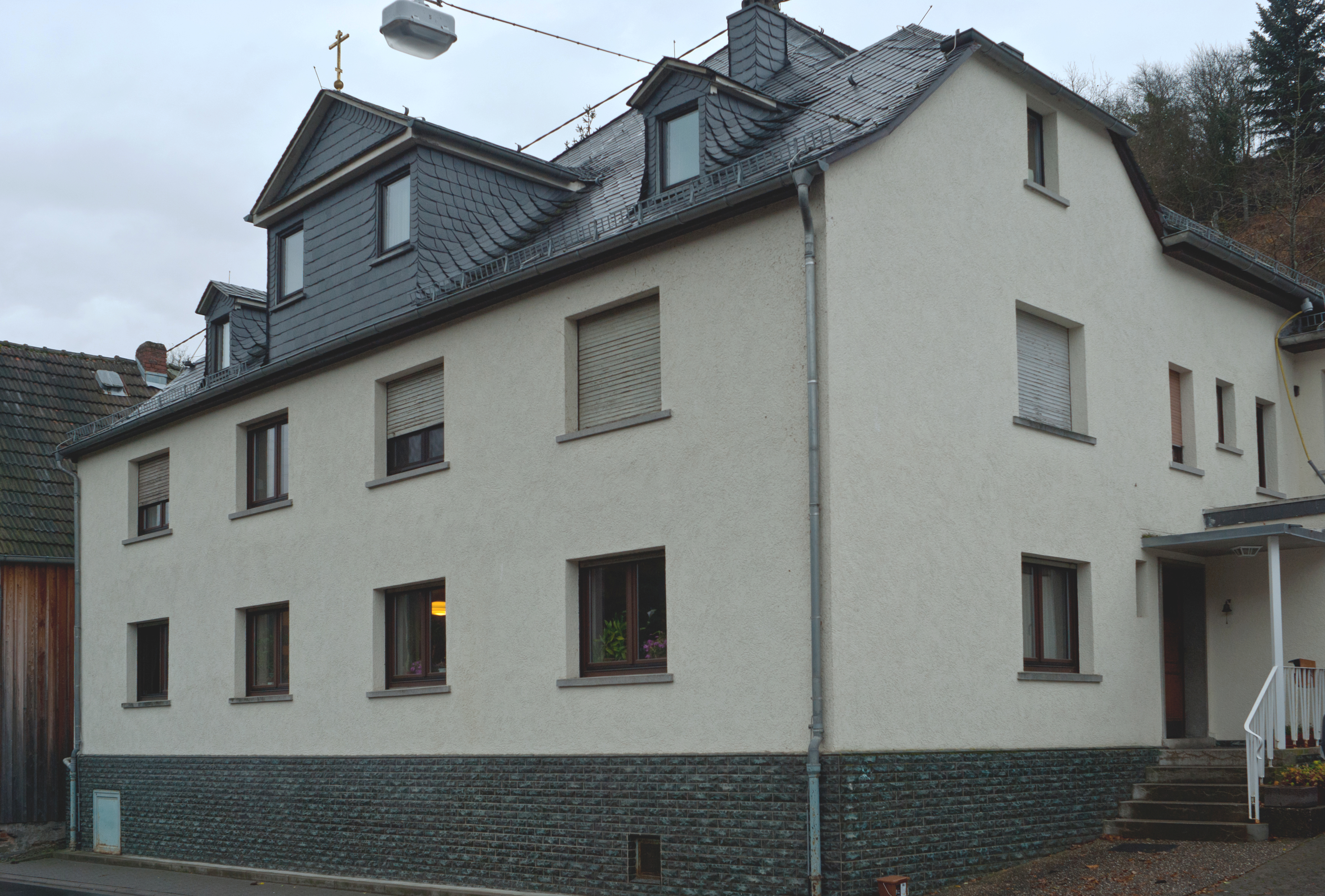 Die orthodoxe Skite in Geilnau an der Lahn